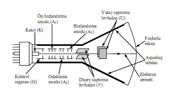 osiloskop